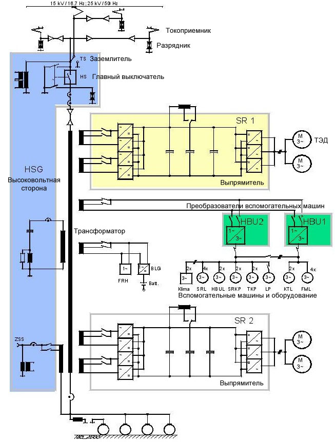 Упрощенная силовая схема электровоза BR 185